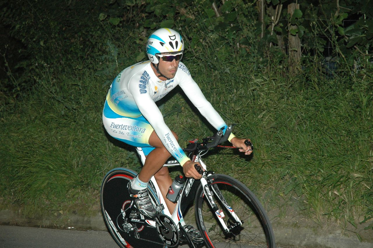 Rodrigo García, Euskal Bizikleta 2007